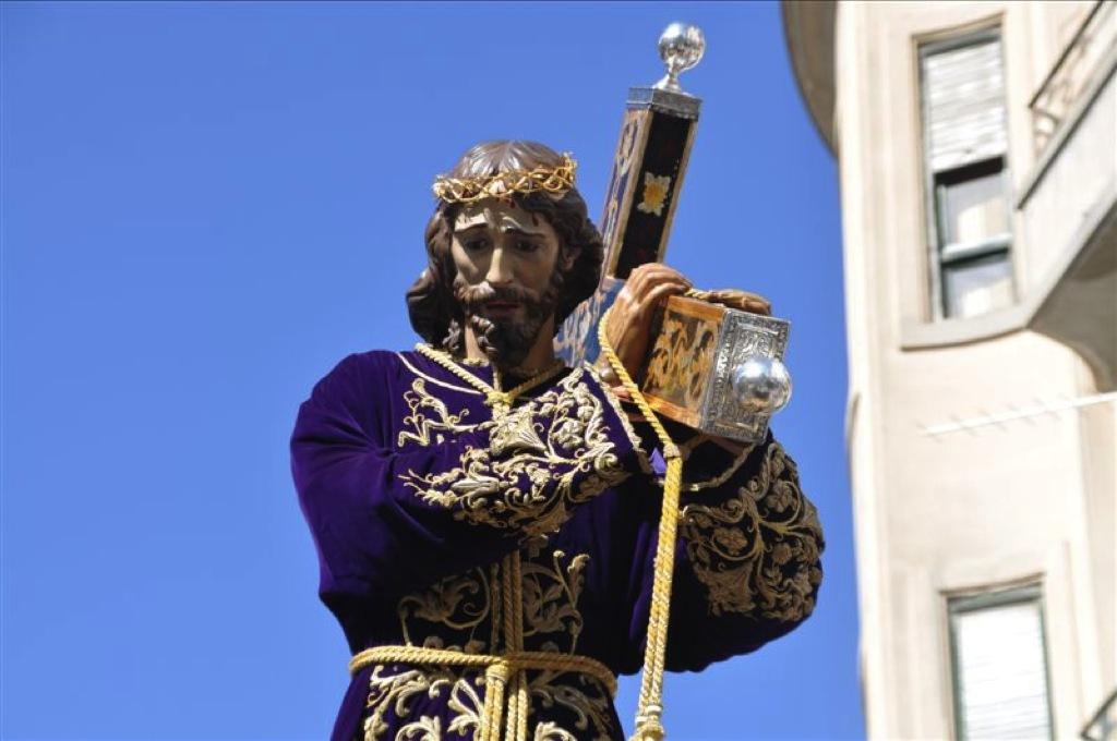 Imagen de Nuestro Padre Jesus de Cieza (Murcia) Realizada por Ignacio Pinazo Martinez